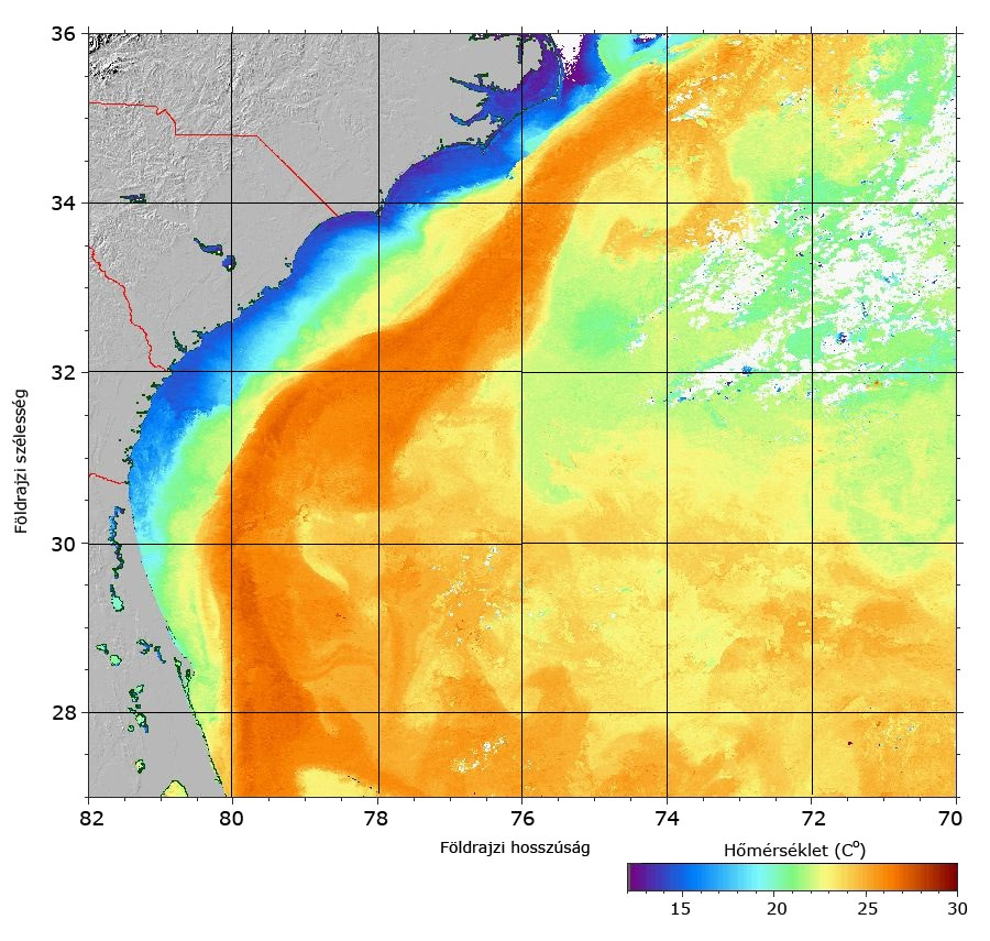 Golf-áramlat térkép